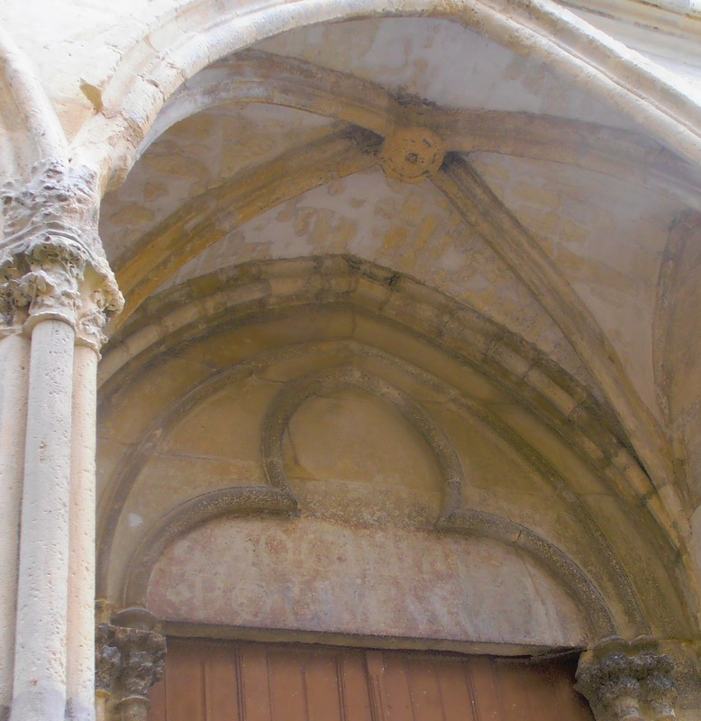 Il s'agit du portail sud du XIII e siècle de l'église Saint-Pierre de Saint-Julien-du-Sault. On peut voir le joint des deux claveaux remplacés par la clé de voute gothique ainsi que l'inscription révolutionnaire société populaire. L'inscription du portail nord ainsi que l'inscription "temple de la raison" ne sont plus visibles.